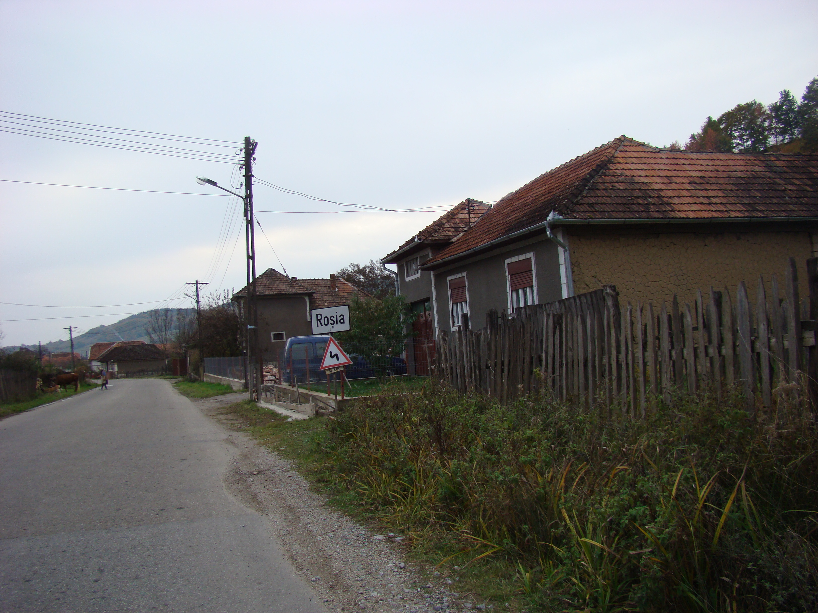 Roșia, județul Bihor